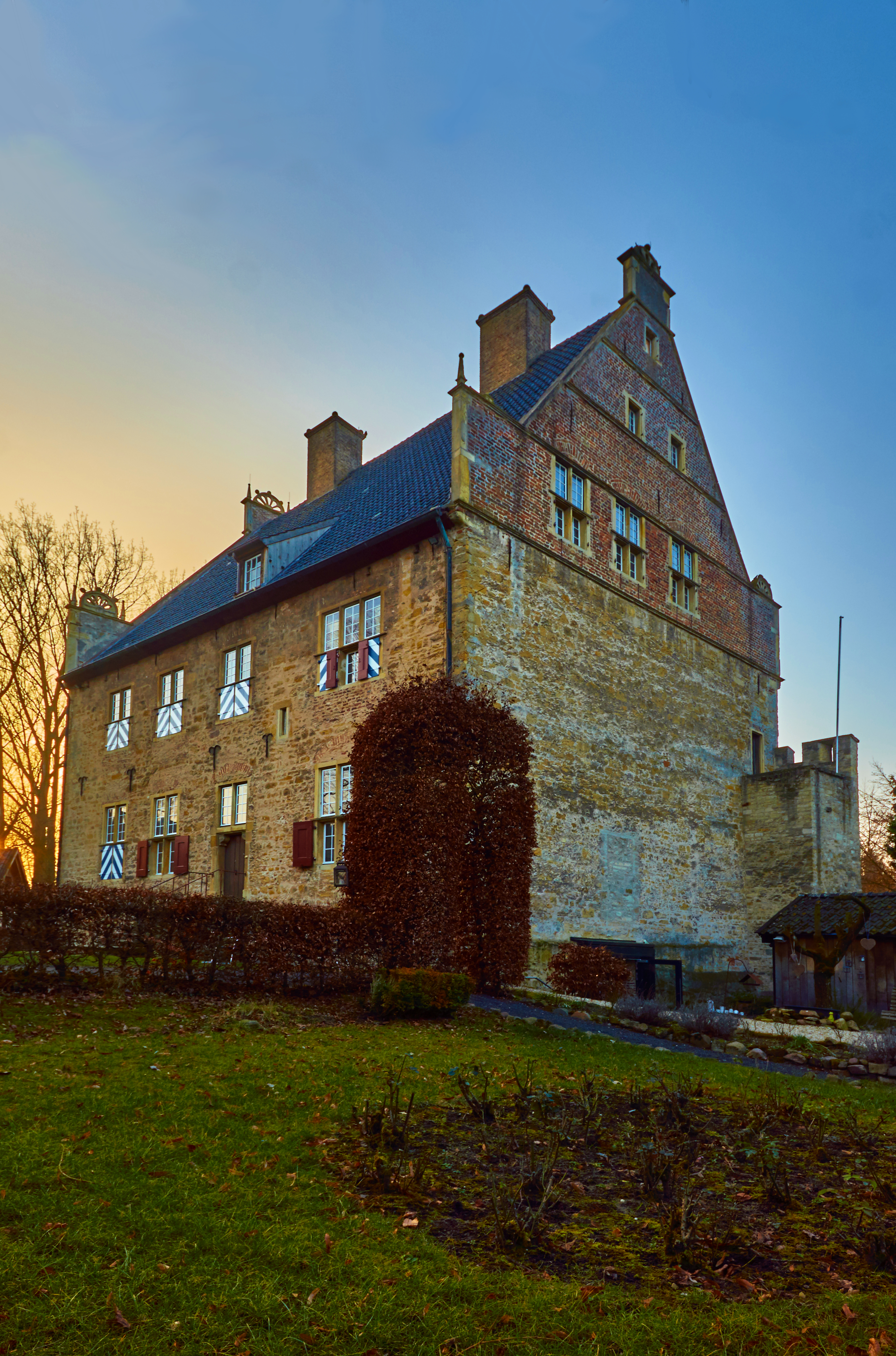 Das Hohe Haus ist als Burgmannshof Teil der ehemaligen Burg Nienborg bei Heek im Münsterland. This is a photograph of an architectural monument.